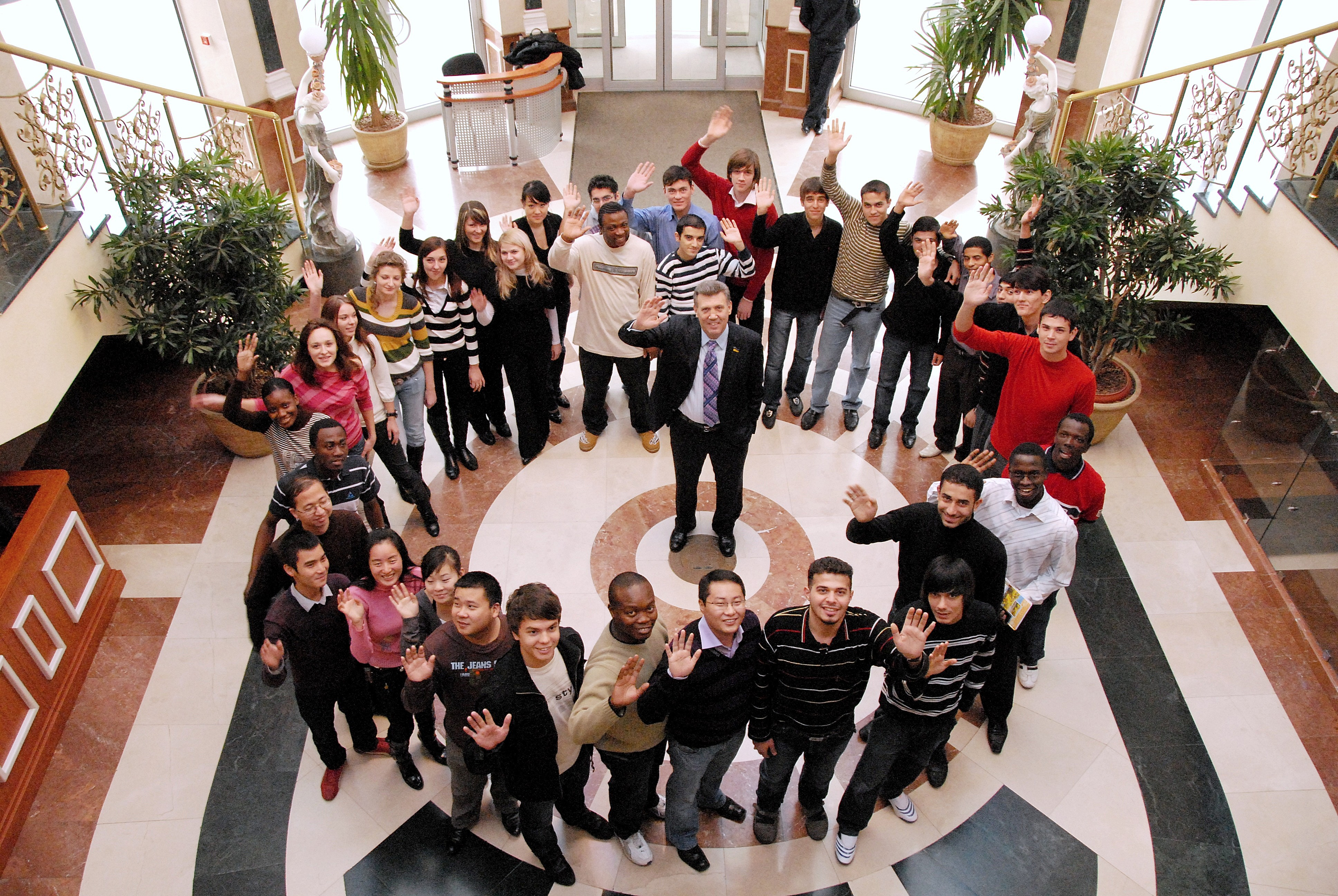 Сергей Васильевич Кивалов и иностранные студенты НУ "ОЮА"